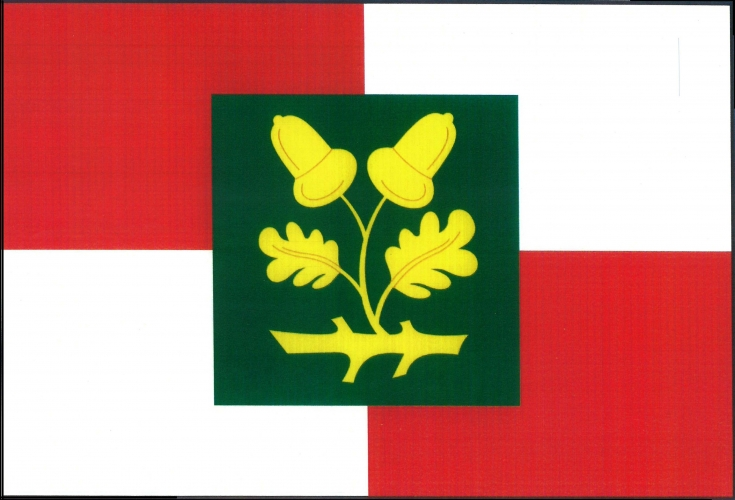 vlajka, Zdobín, okres Trutnov